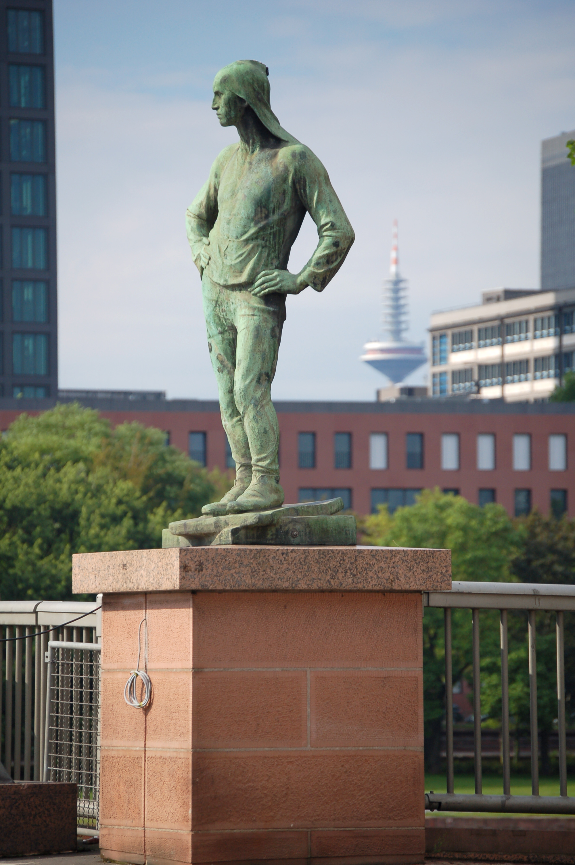 Skulptur „Der Hafenarbeiter“ am Südufer der Friedensbrücke in Frankfurt am Main